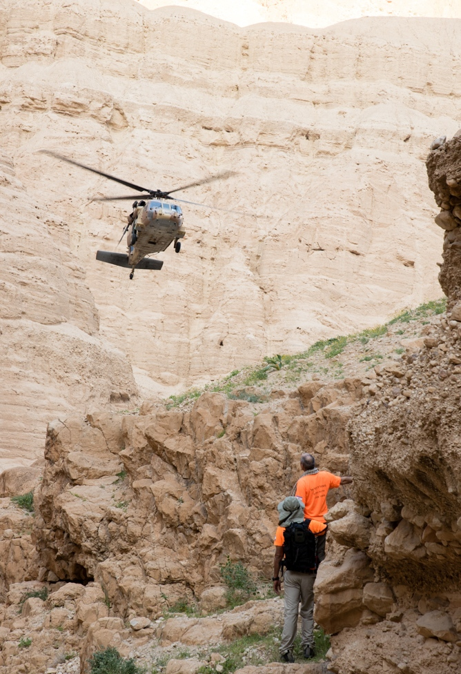 חילוץ מנחל דרדה - יחידת חילוץ מגילות ים המלח